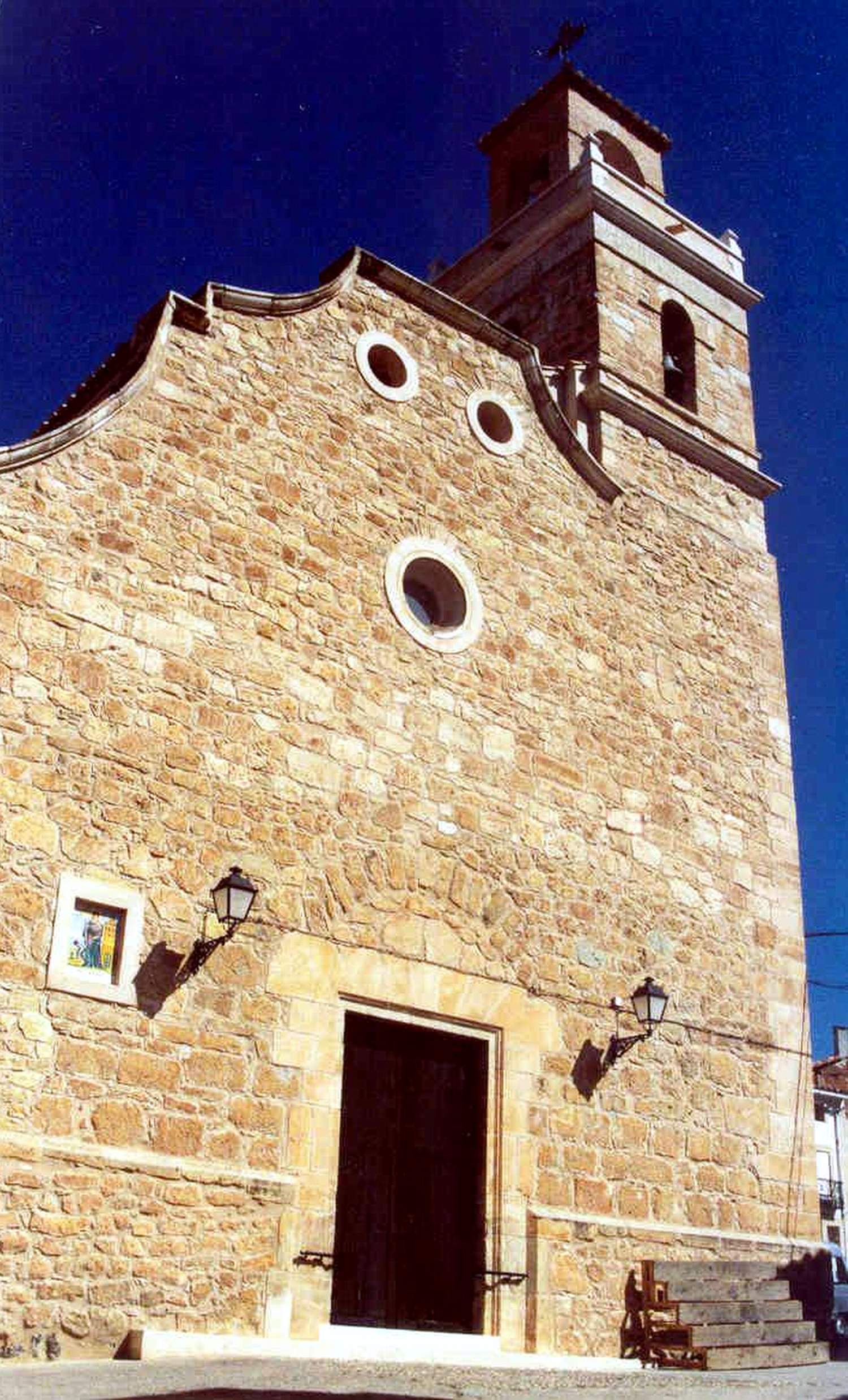 Vista frontal (oriental) de la parroquial de Casas Bajas (Valencia), con detalle de la entrada y torre-campanario a los pies, lado de la epístola.